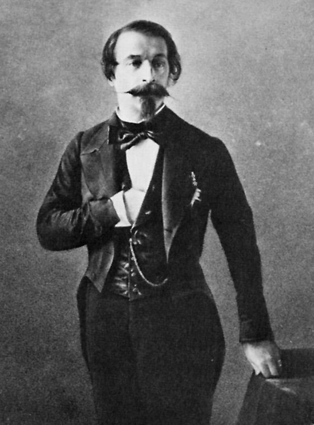 Mayer & Pierson: Napoléon III.